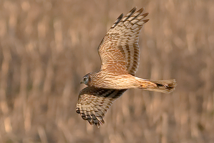 Albanella reale femmina (Circus cyaneus)